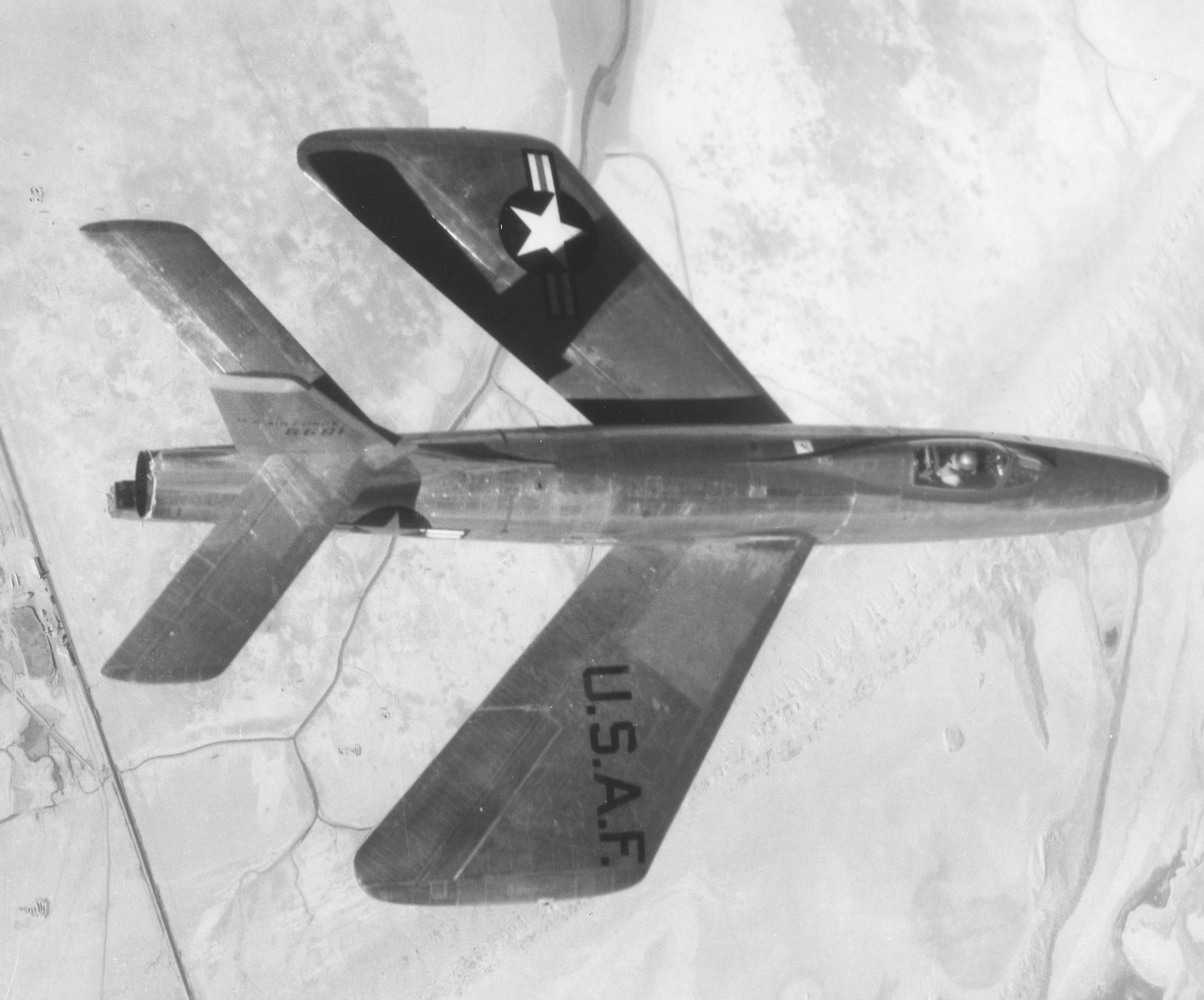 Republic XF-91